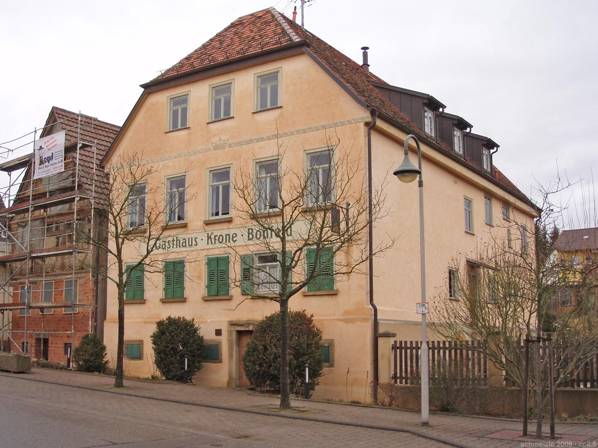 Historisches Gasthaus Krone in Bad Rappenau-Bonfeld, erbaut im späten 18. Jhd., 2003 mit einem Denkmalschutzpreis ausgezeichnet.